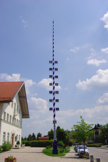 Pfaffing: Maibaum